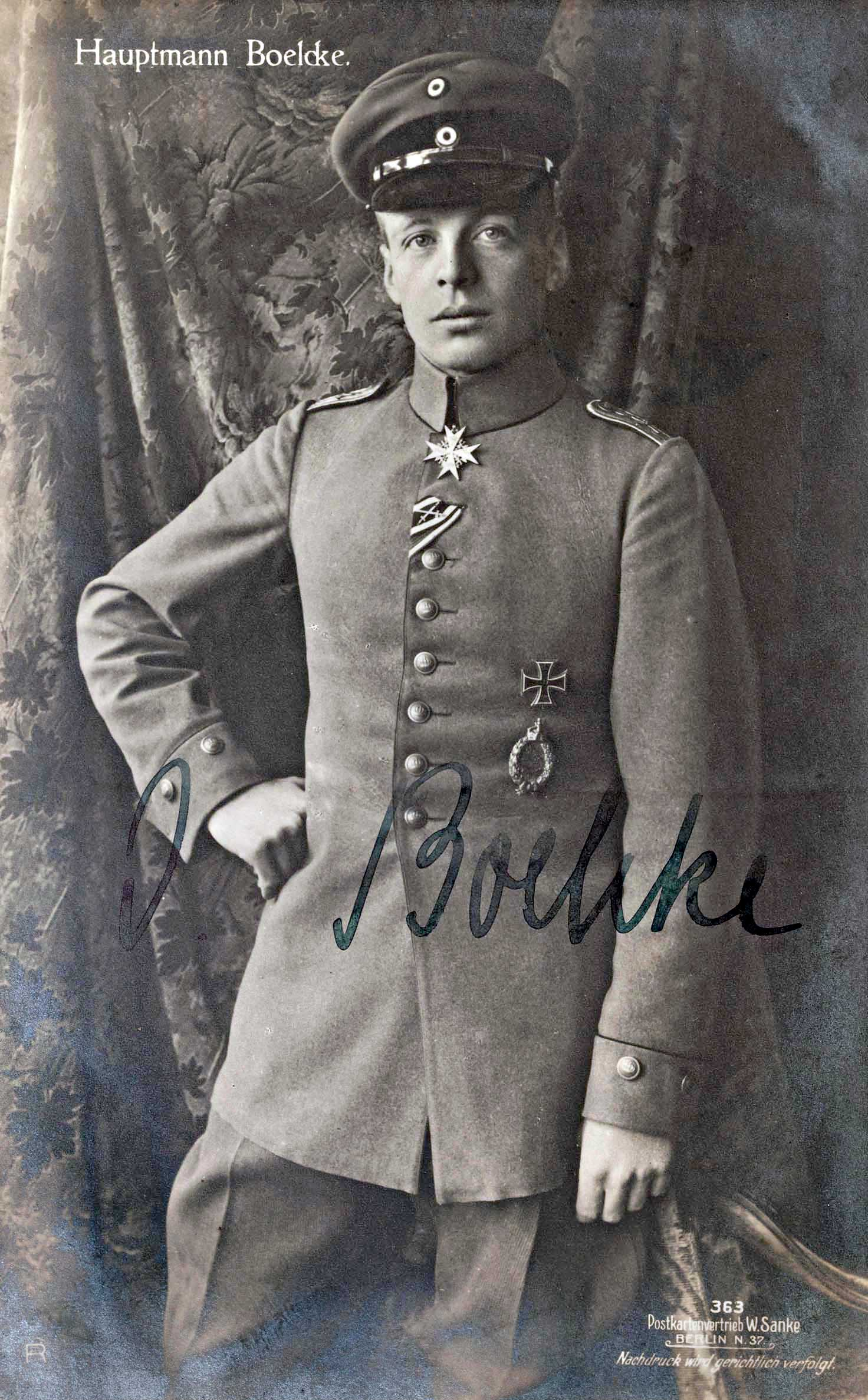 Hauptmann Boelcke – Originalunterschrift auf Sanke-Karte